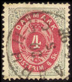 Почтовая марка Дании с названием государства, 1870 год.